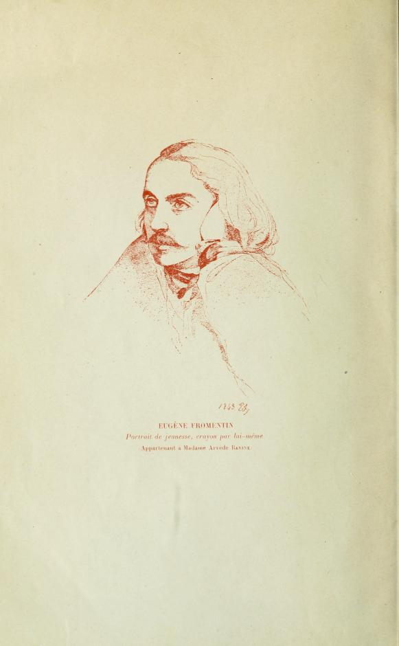 Portrait d'Eugène Fromentin par lui-même en frontispice de Eugène Fromentin écrivain et peintre Le Pays d'Ouest 1920 [1].